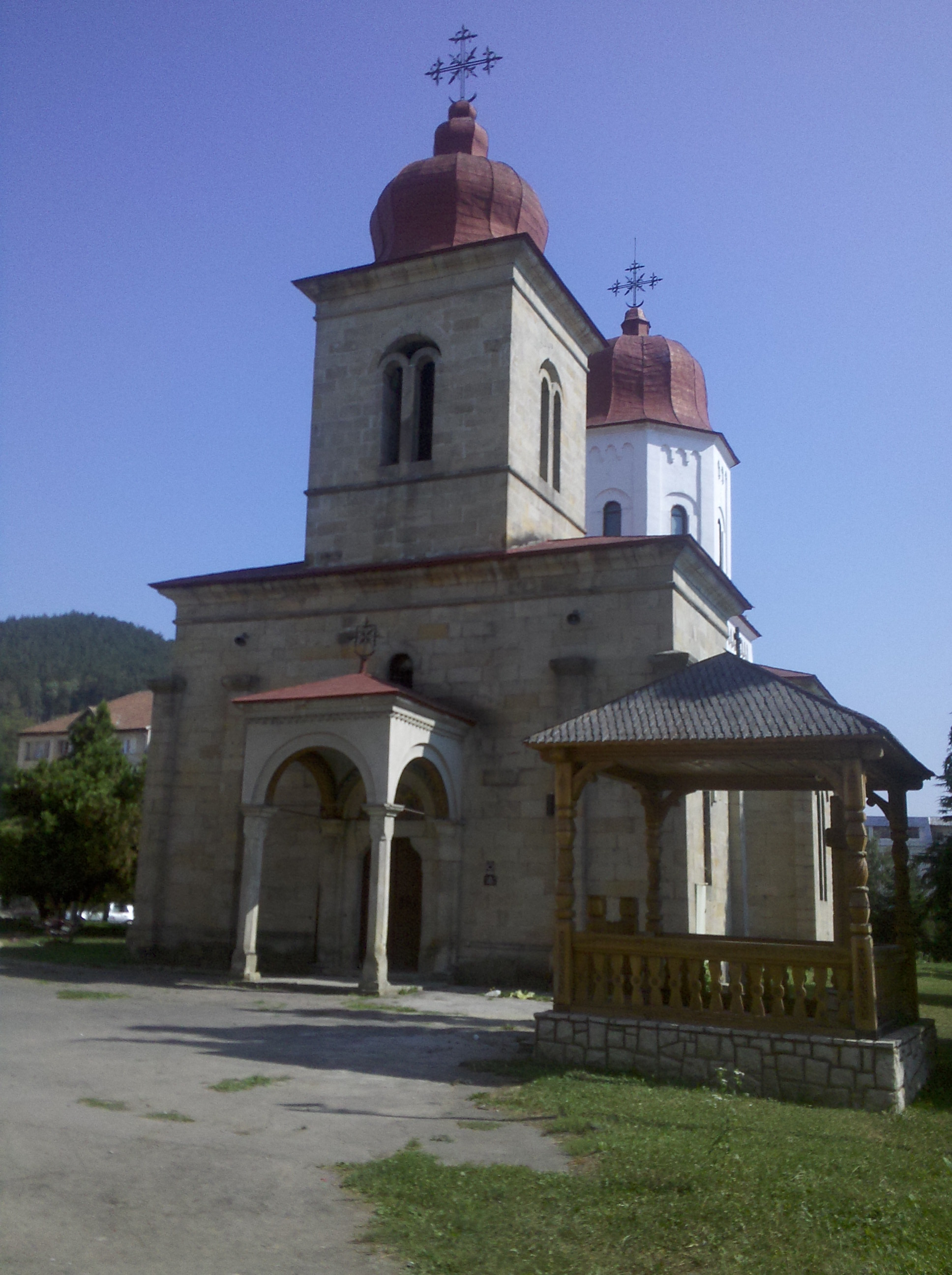 Biserica cu hramul Adormirea Maicii Domnului din Târgu Ocna.